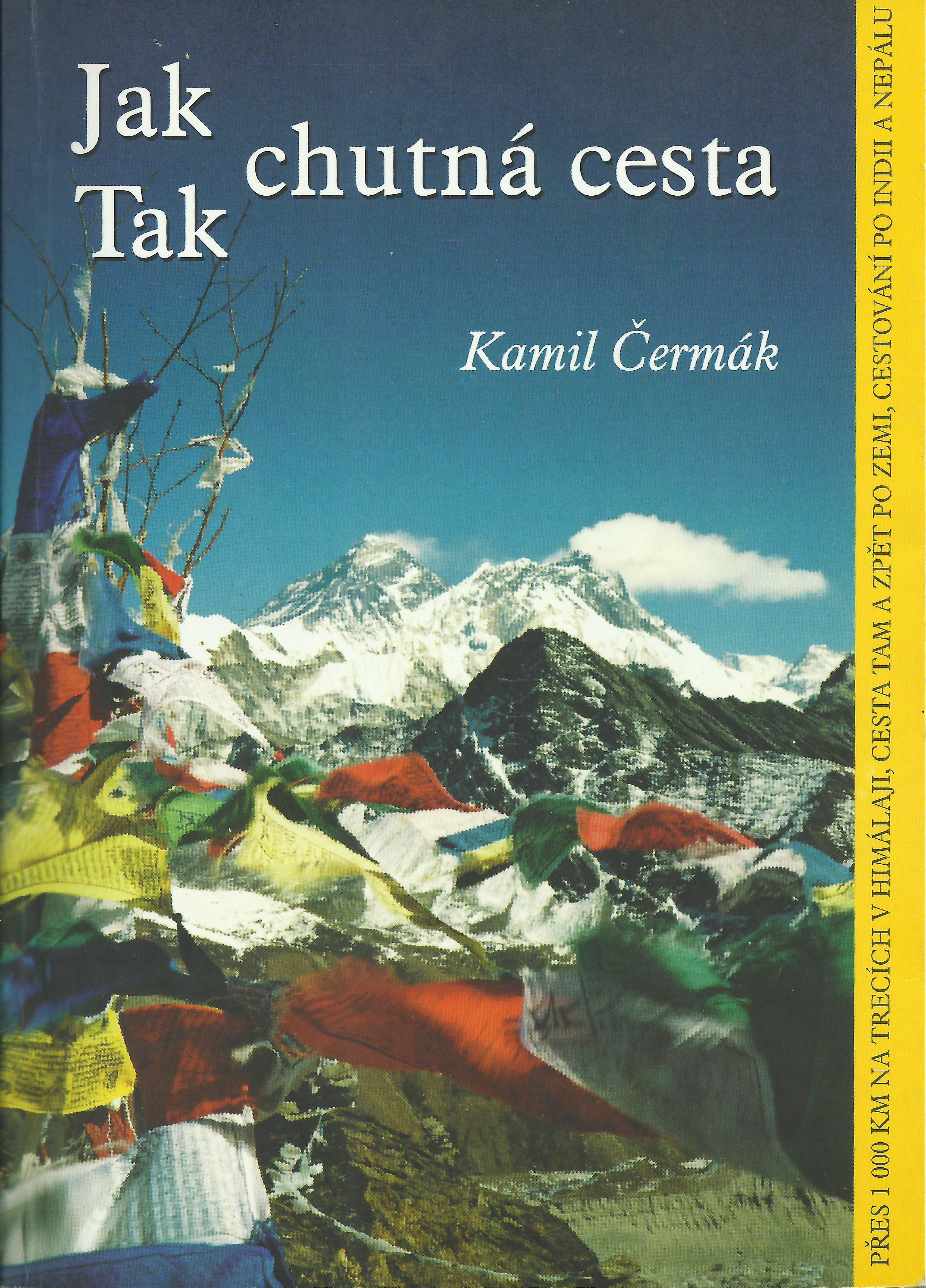 Přebal knihy Jak Tak chutná cesta